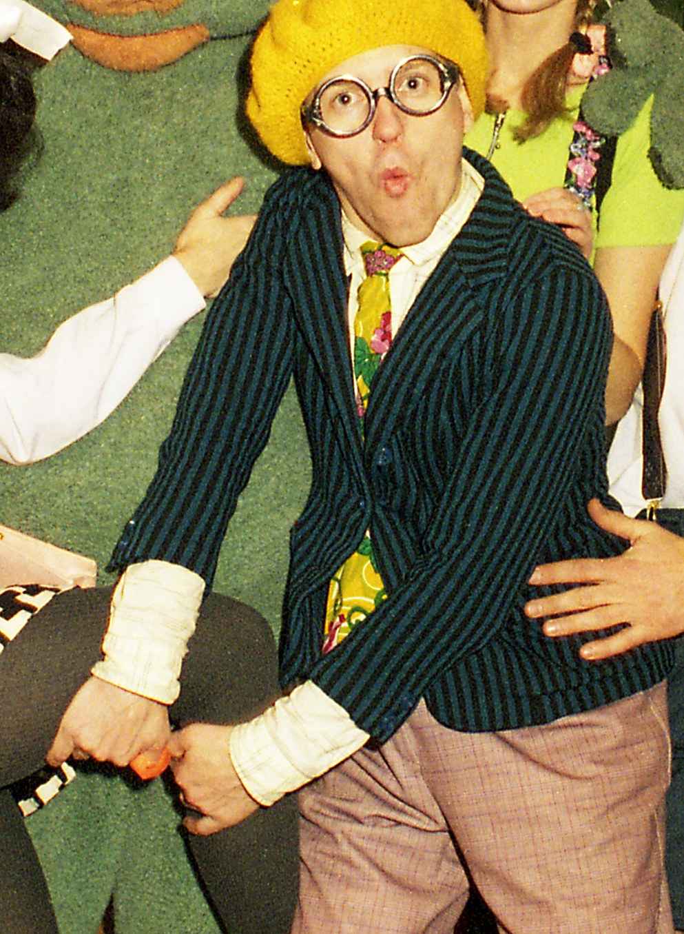 Venno Loosaar, näitleja, telestsenarist ja -lavastaja 98